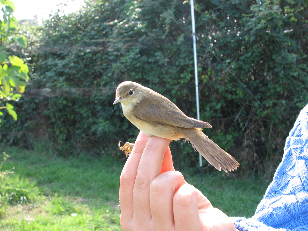 (Acrocephalus scirpaceus) Fotografai questa Cannaiola durante un'attività di inanellamento (io ero un semplice spettatore..) nell'Oasi "La Valle" sul lago Trasimeno.